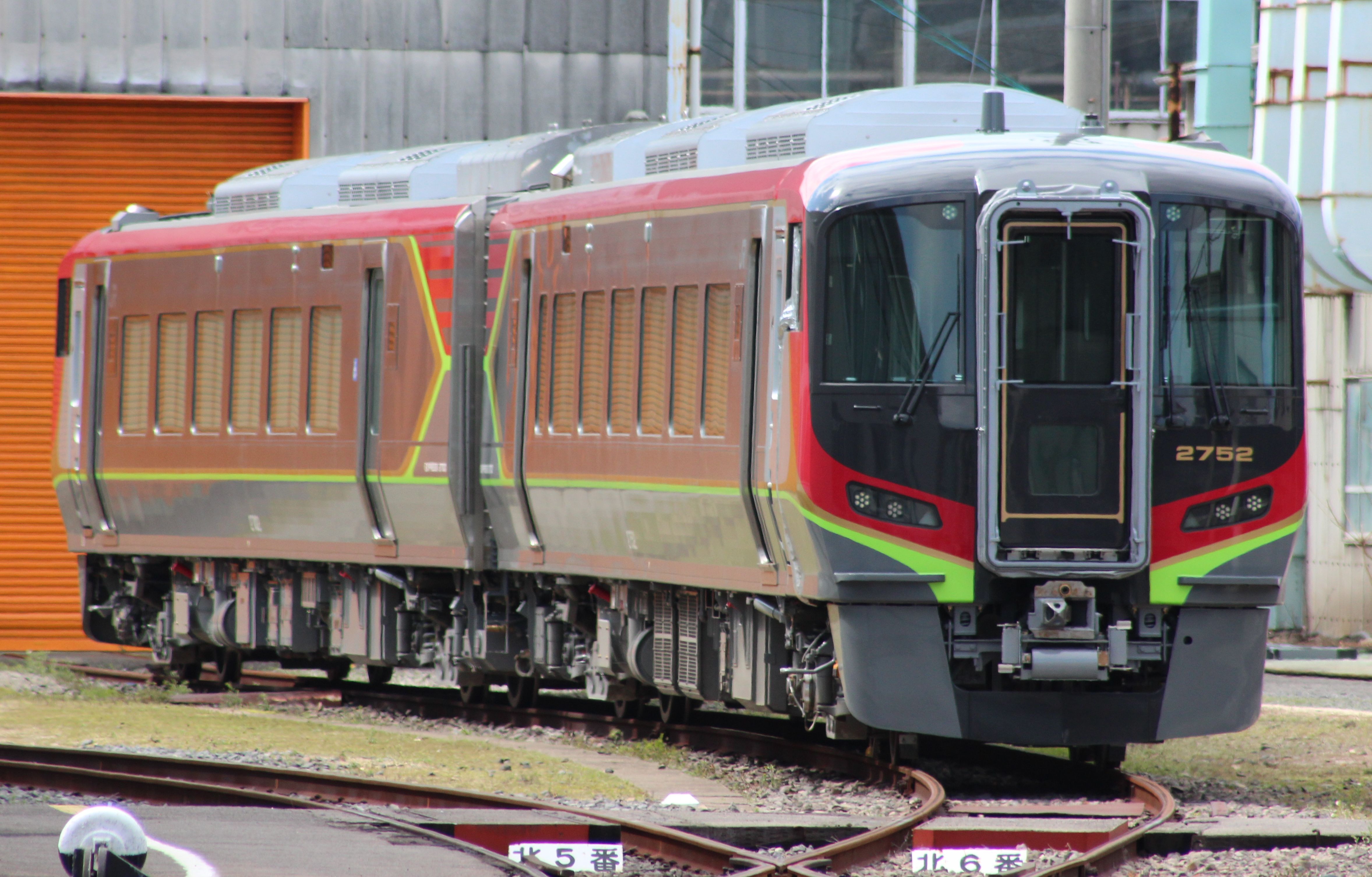 JR四国 2700系特急型気動車